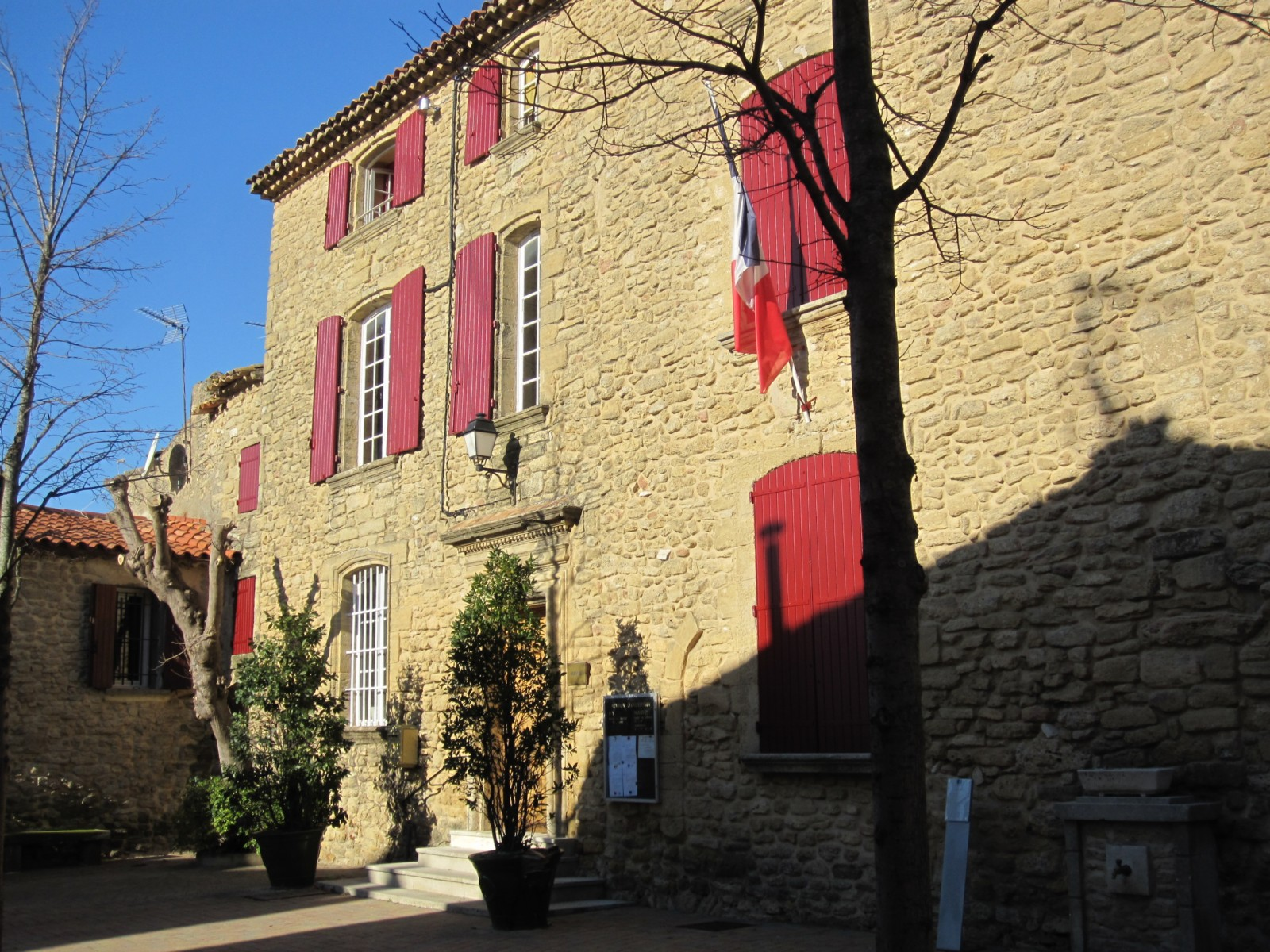 Mairie de Cornillon-Confoux France